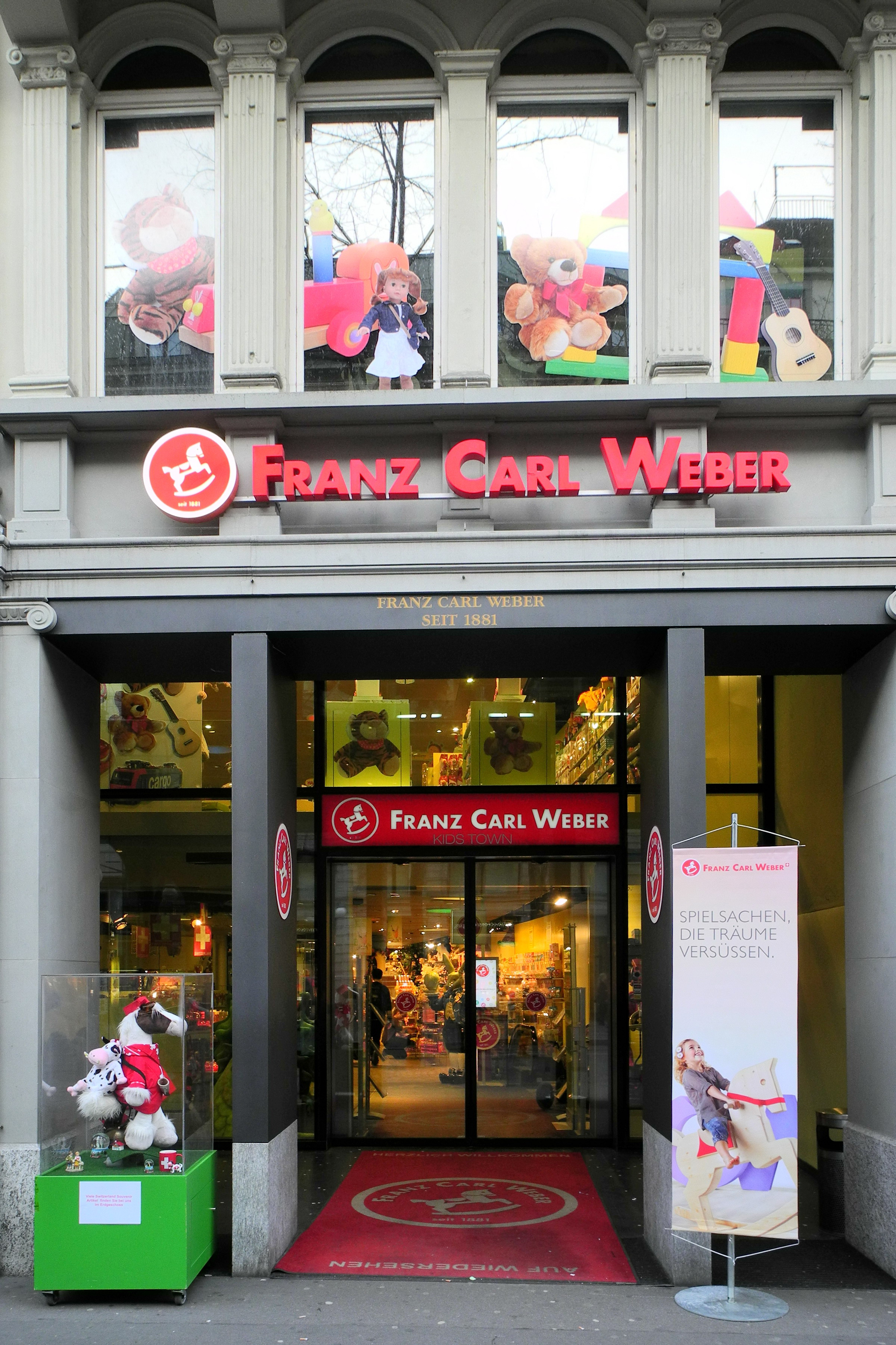 Franz Carl Weber, Bahnhofstrasse in Zürich (Switzerland)